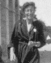 Clara Ragaz-Nadig (1874-1957), et Leonhard Ragaz (1868-1945), théologien suisse.